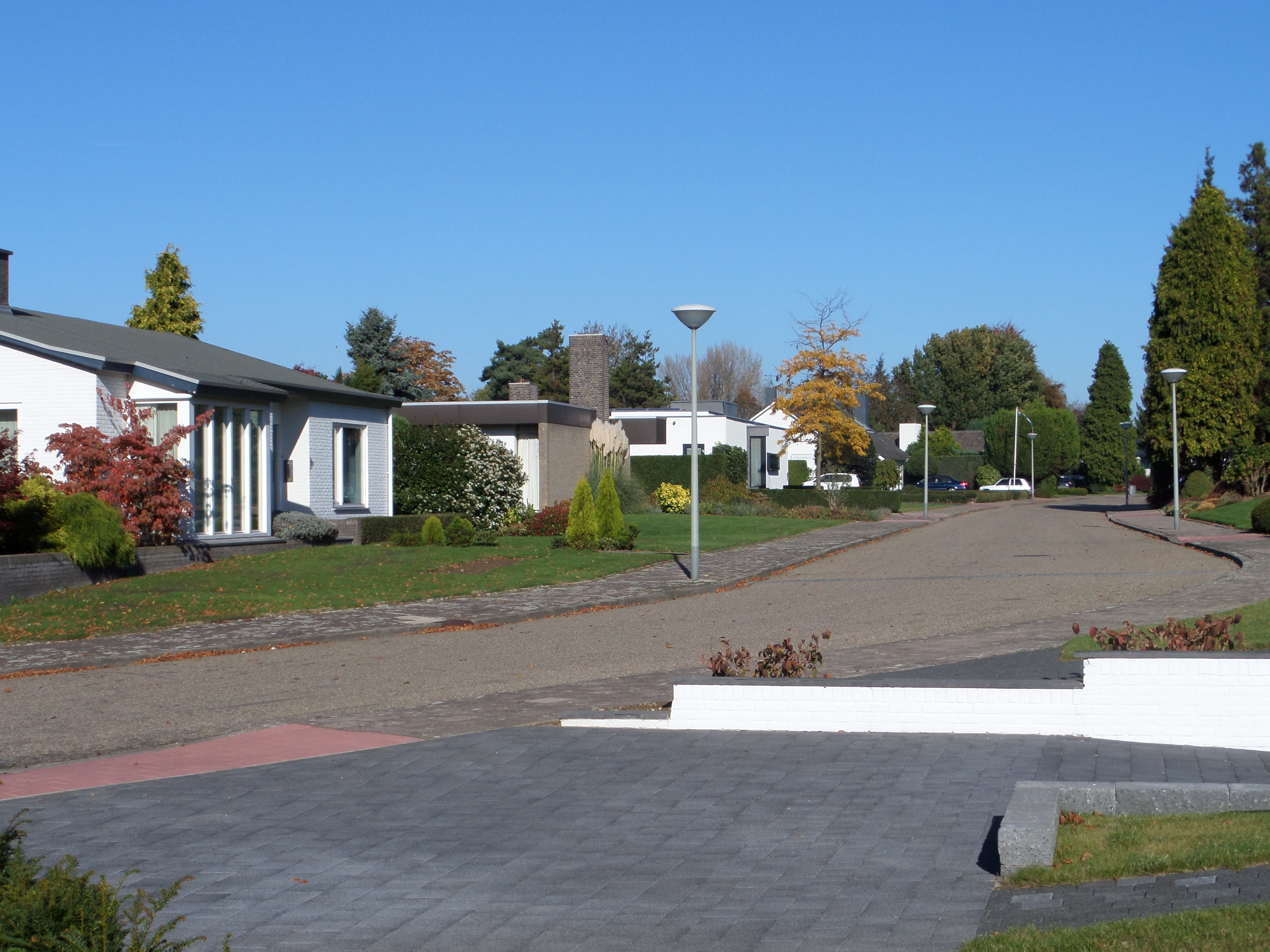 De Reubsaetlaan in de Sittardse wijk Kollenberg